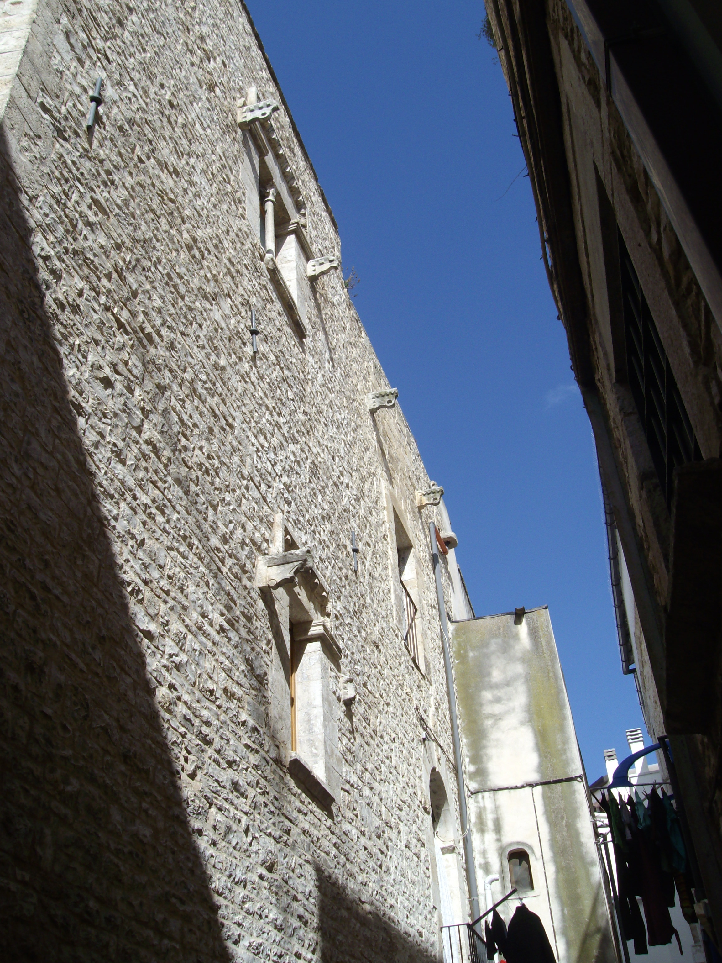 Casa dei Cavalieri di Malta a Bitetto